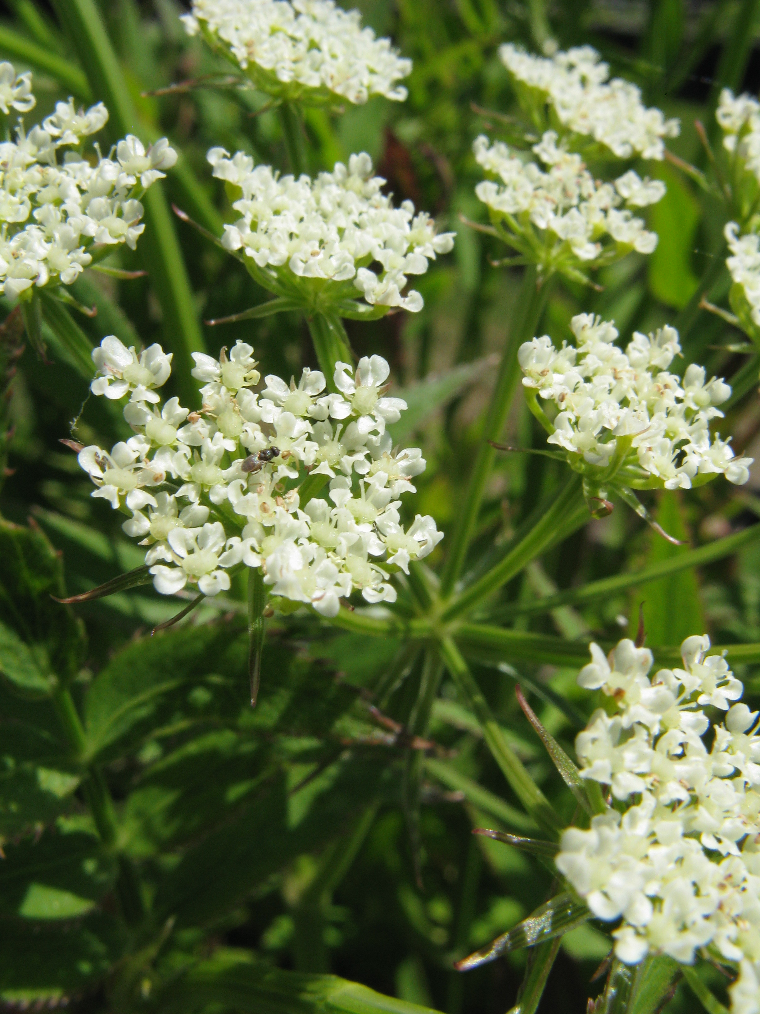 Scientific name Sium suave var. nipponicum